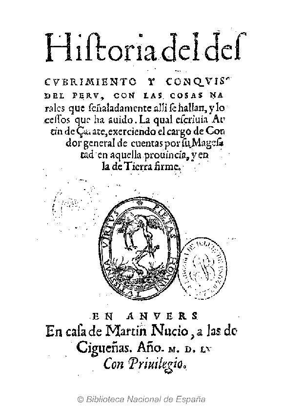 Historia del descubrimiento y conquista del Peru : con las cosas naturales que señaladamente alli se hallan, y los sucessos que ha auido la qual escriuia Augustin de Çarate ... Autor: Zárate, Agustín de (1506-ca. 1565) Fecha: 1555 Datos de edición: Anvers en casa de Martin Nucio (Nutius, Martin)